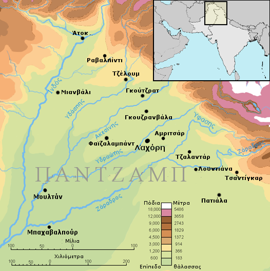 Greek translation of File:Punjab map (topographic) with cities.png